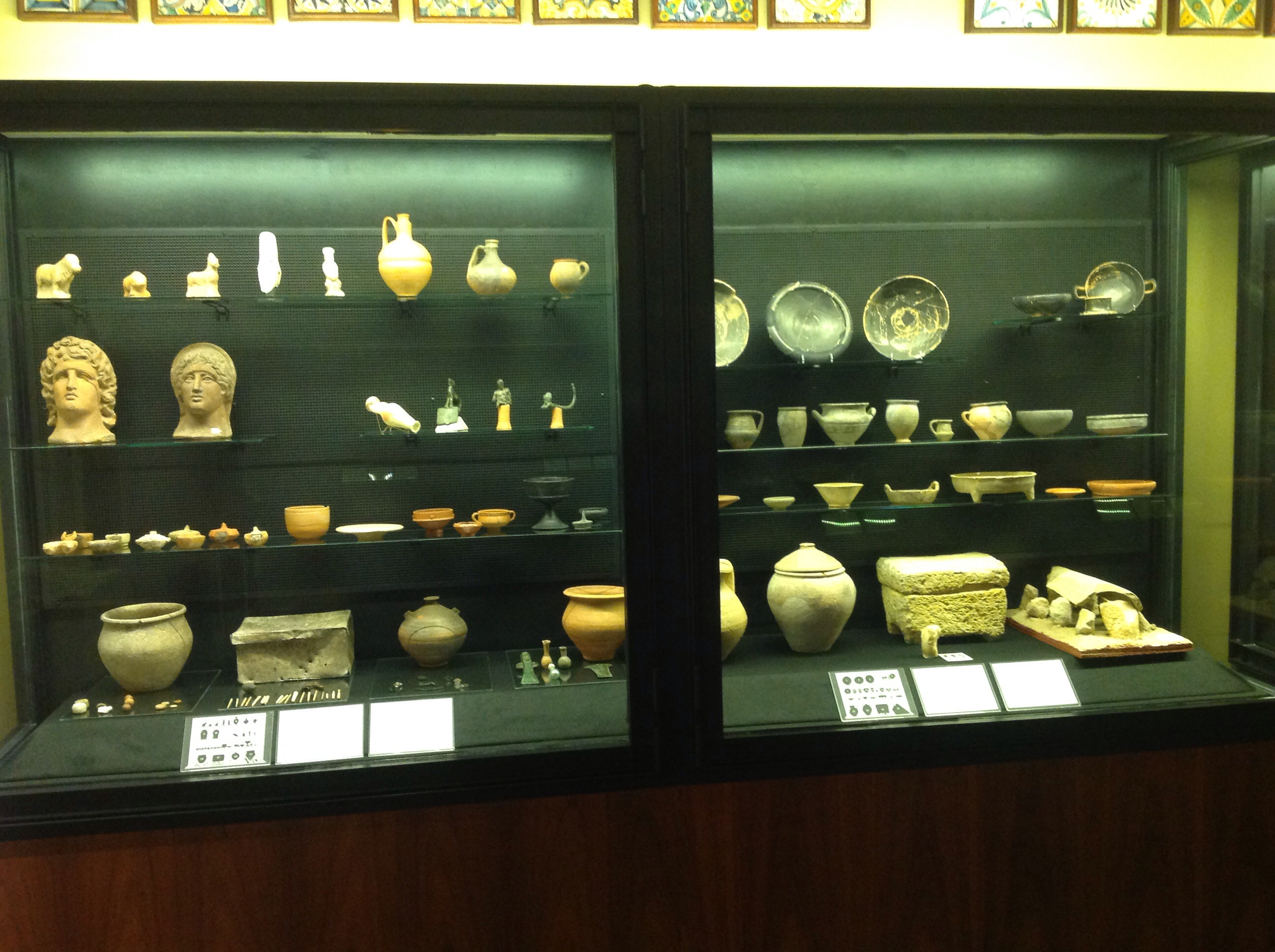 interiors Biblioteca Museu Víctor Balguer febrer 2015